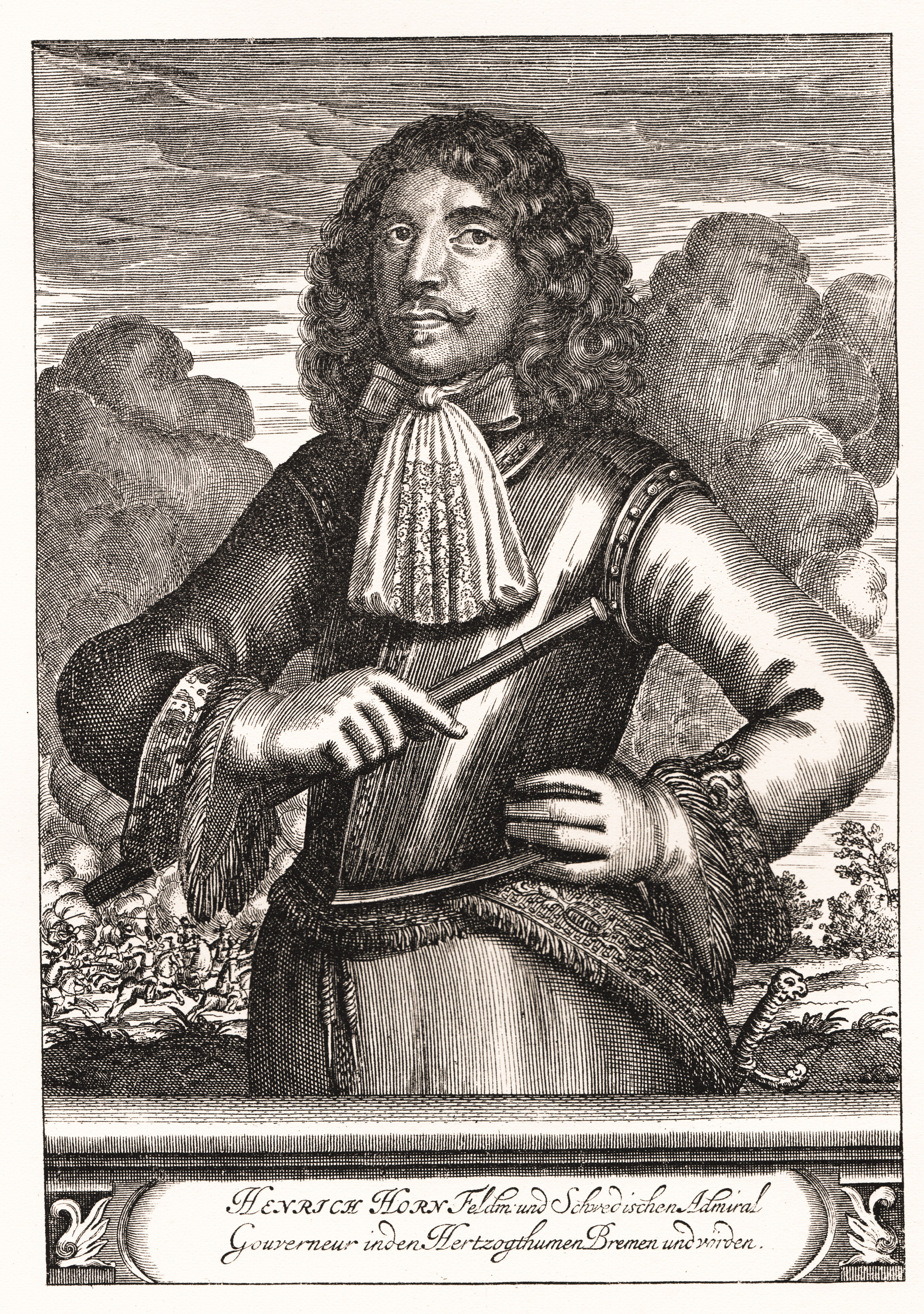 Henrik Horn af Marienborg (1618–1693). Den här afbildade gravyren saknar signatur, men torde härröra från C. Hagen. Af denna finnas tvenne äfvenledes anonyma efterbildningar, som dock förete väsentliga olikheter.